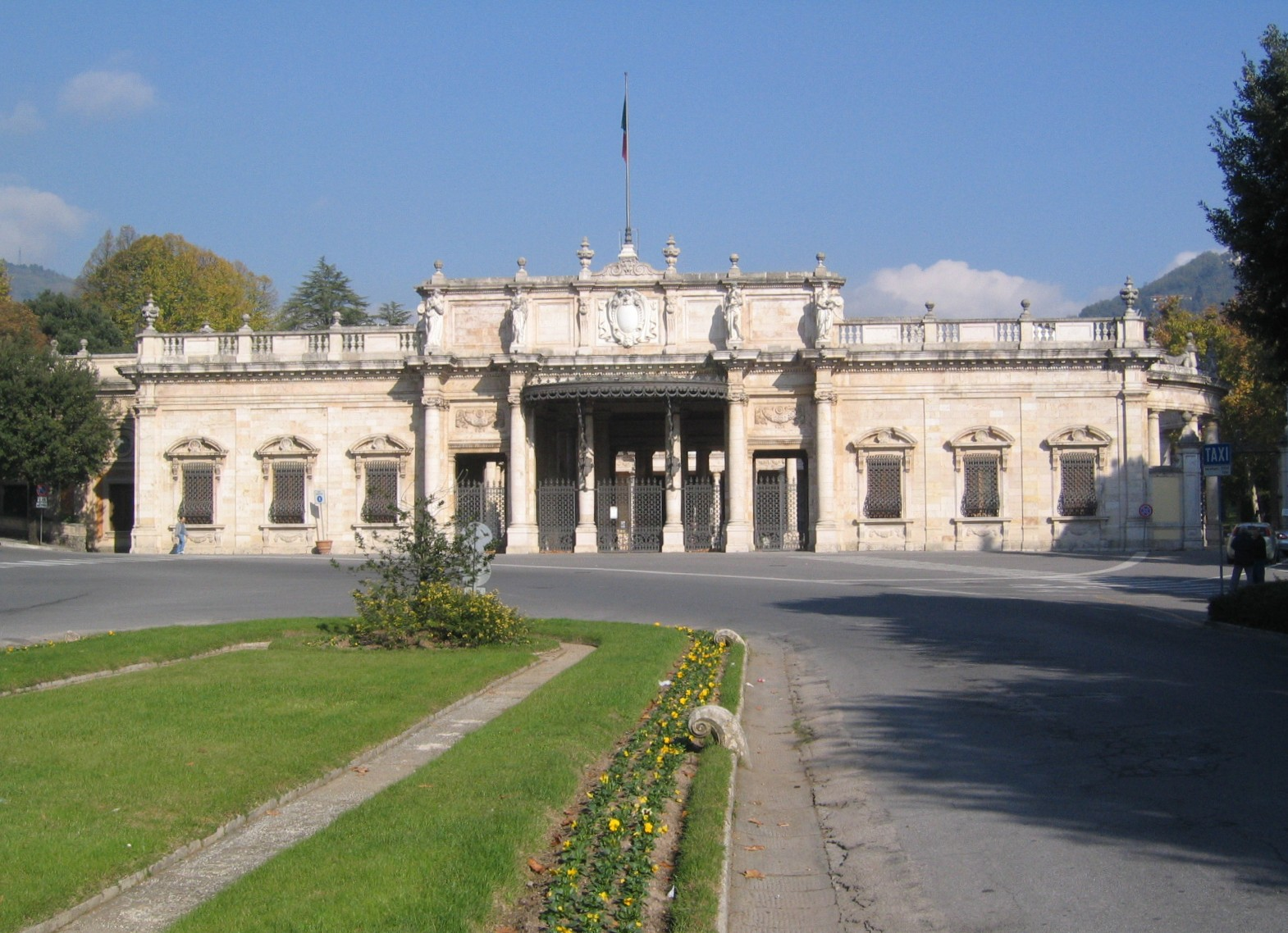 Montecatini Terme, Stabilimento Tettuccio